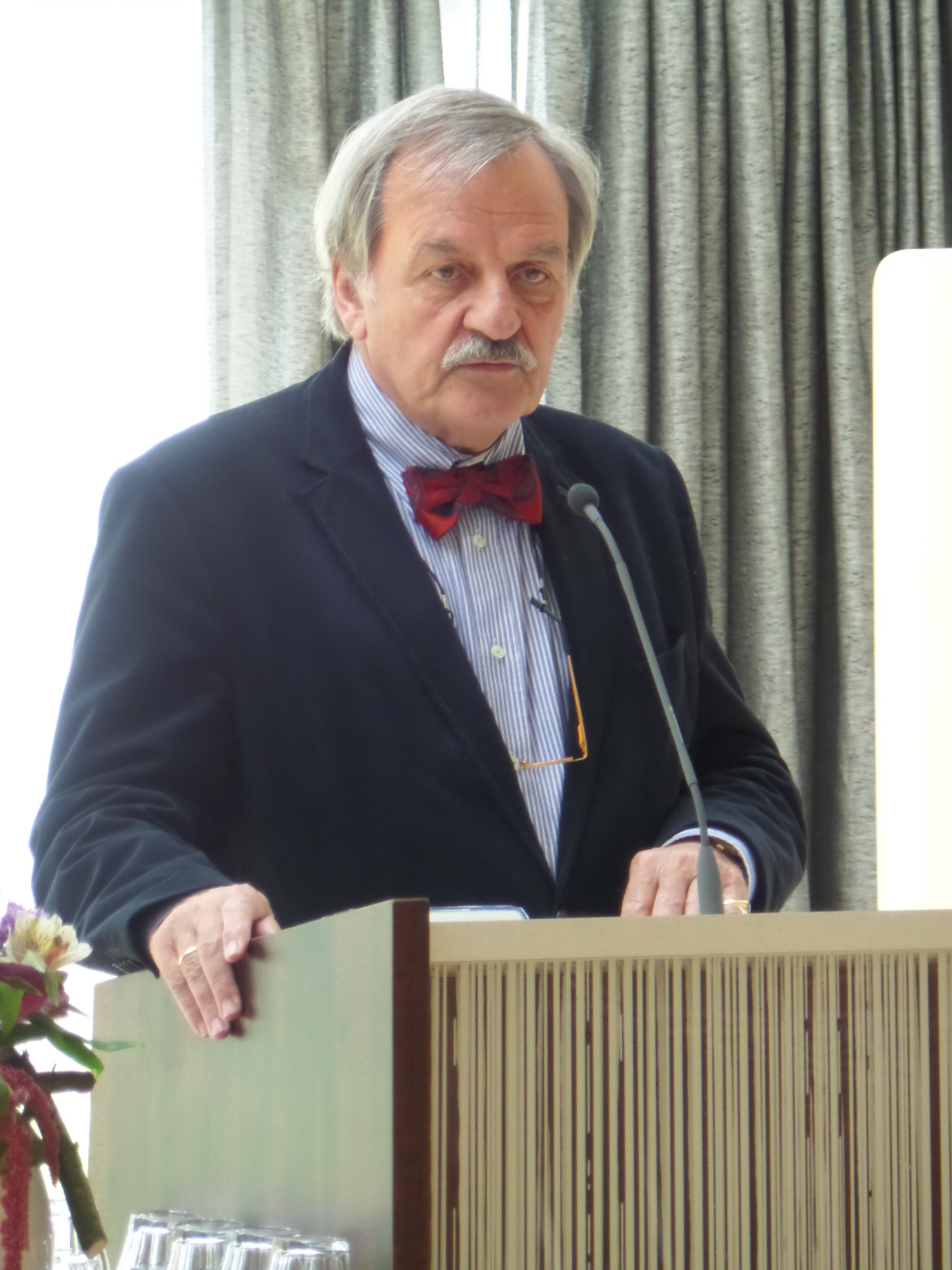 Alexander Münninghoff tijdens zijn lezing over zijn boek 'De stamhouder' bij Stichting Russisch Ereveld in Leusden op 9 mei 2015.